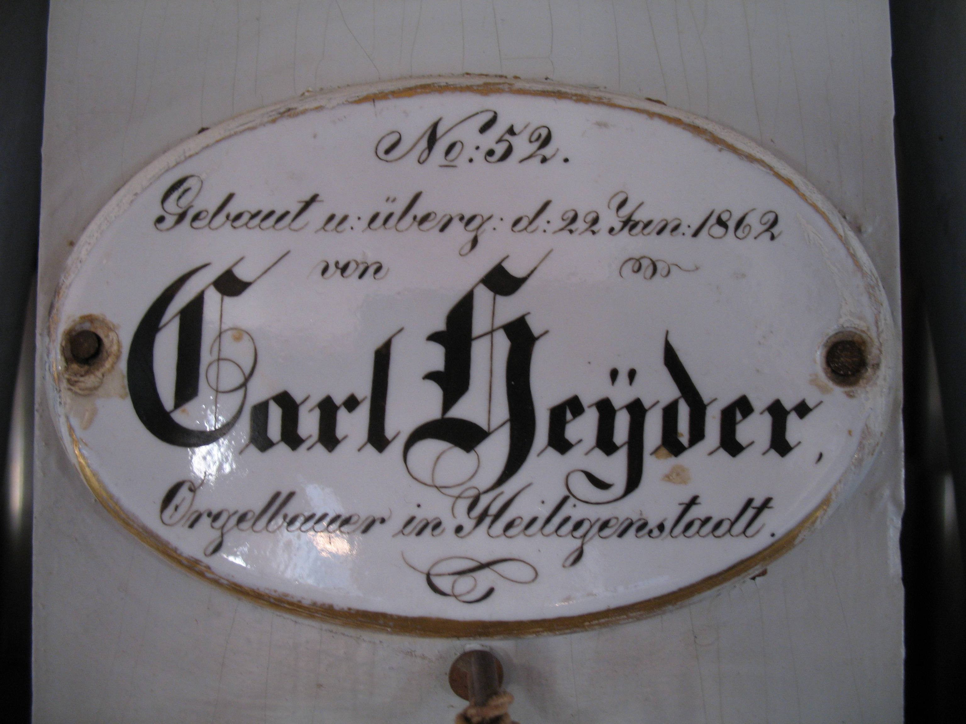 Firmenschild von Carl Heyder, Orgel in Lödingsen, Landkreis Göttingen, Niedersachsen